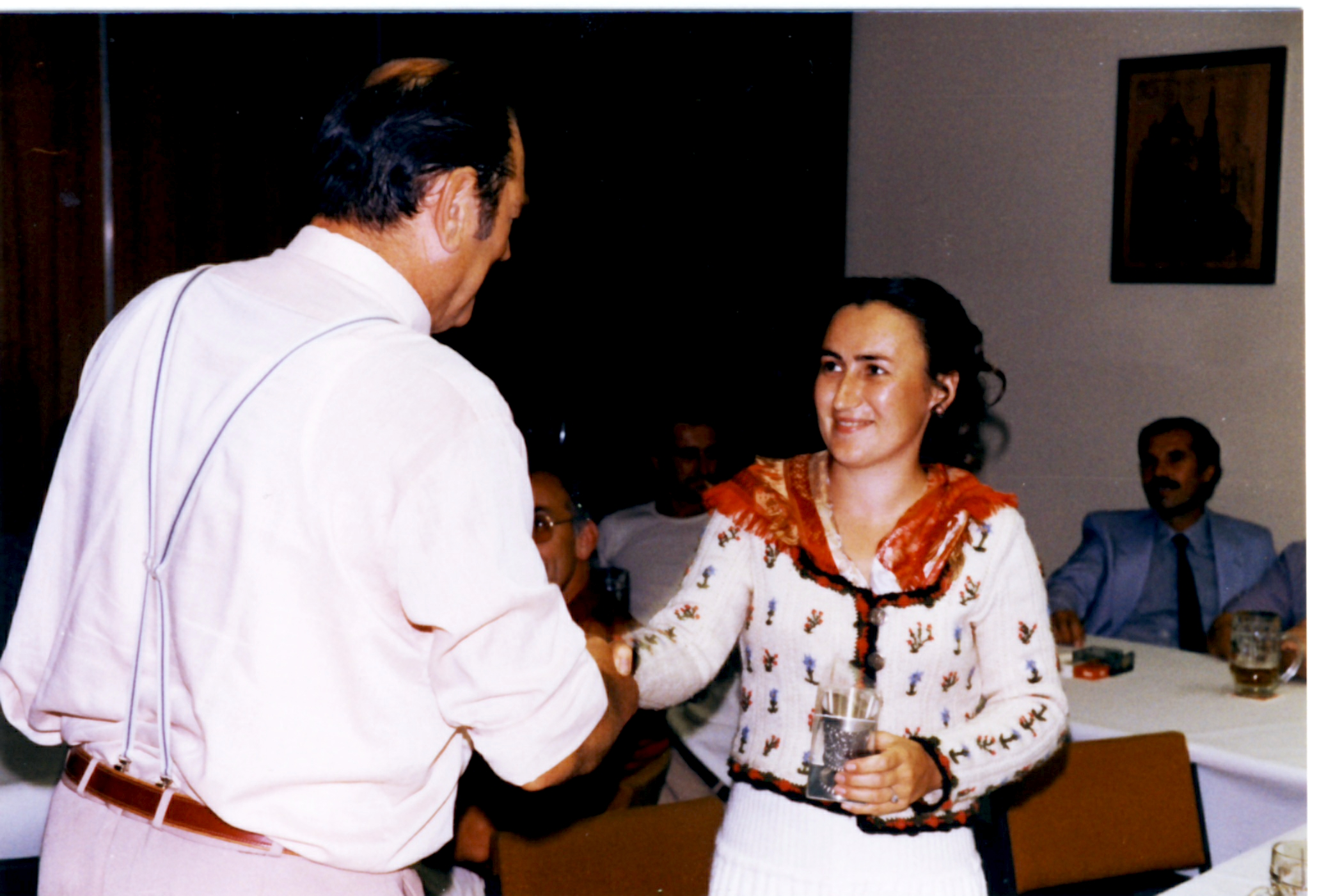 Bürgermeister Hans Sulzer gratuliert Frau Ursula Lindstedt zur Annahme ihres Wappens für die Gemeinde Kalchreuth. Die Regierung von Mittelfranken genehmigte das Wappen am 10. 12. 1981